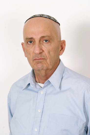 אדמונד לוי. שופט בית המשפט העליון.